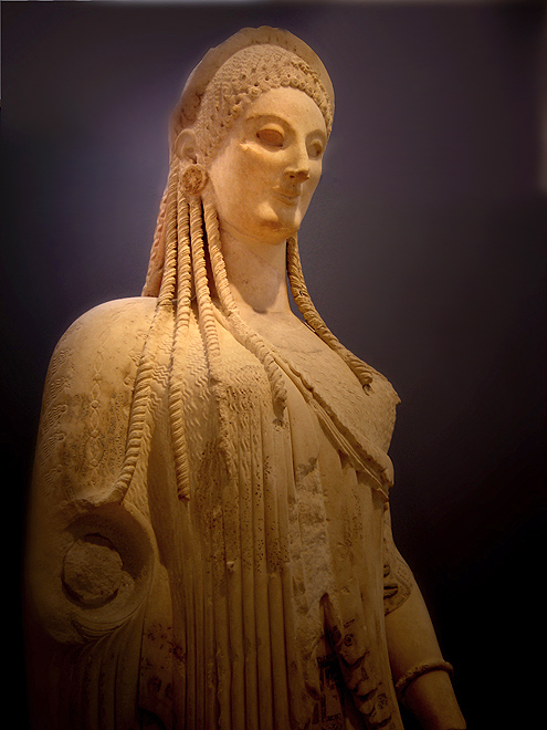 Kore